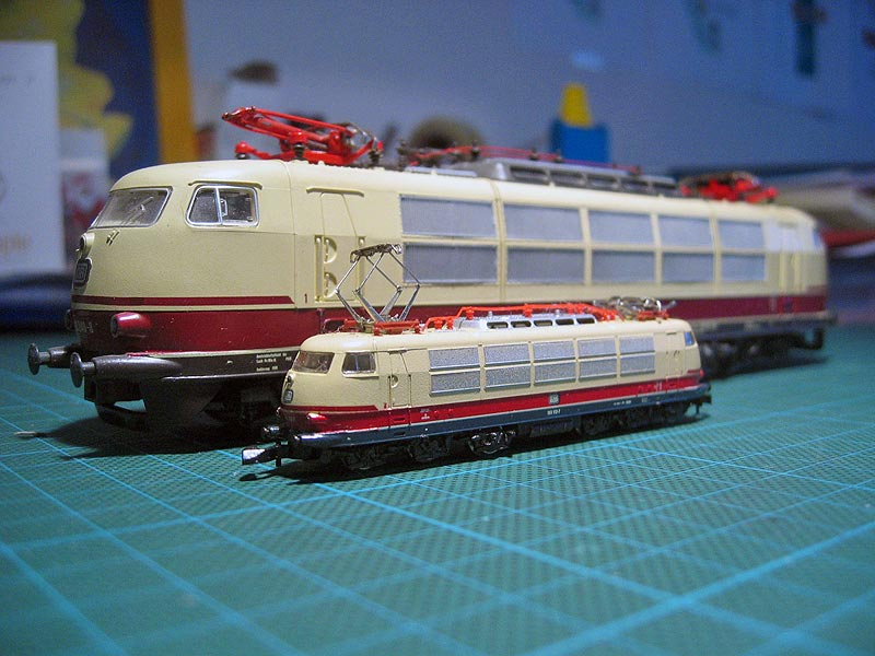 Titel: BR 103 im Vergleich: Spur H0 und Spur Z Fotograf/Ersteller: Uli Kutting